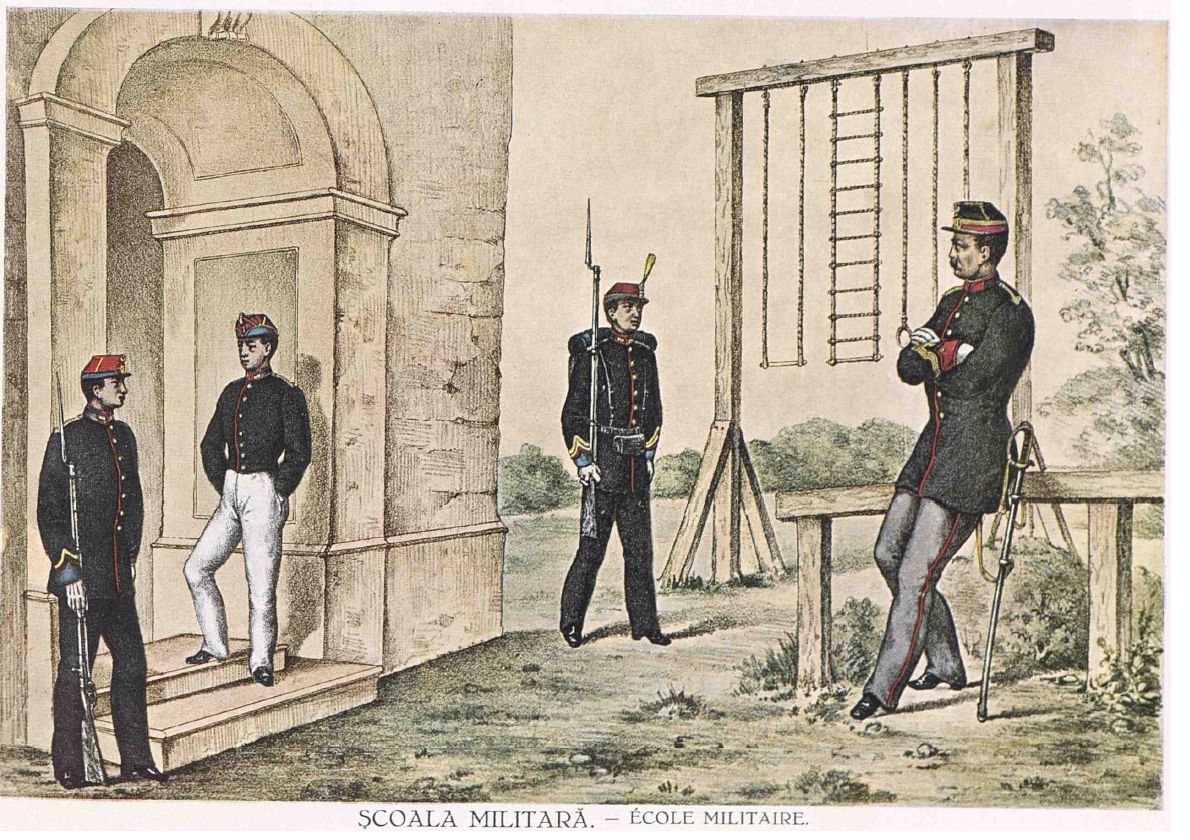 Imaginea prezintă diferitele uniforme ale elevilor Şcolii Militare de Infanterie şi Cavalerie, în ultima parte a secolului XIX.